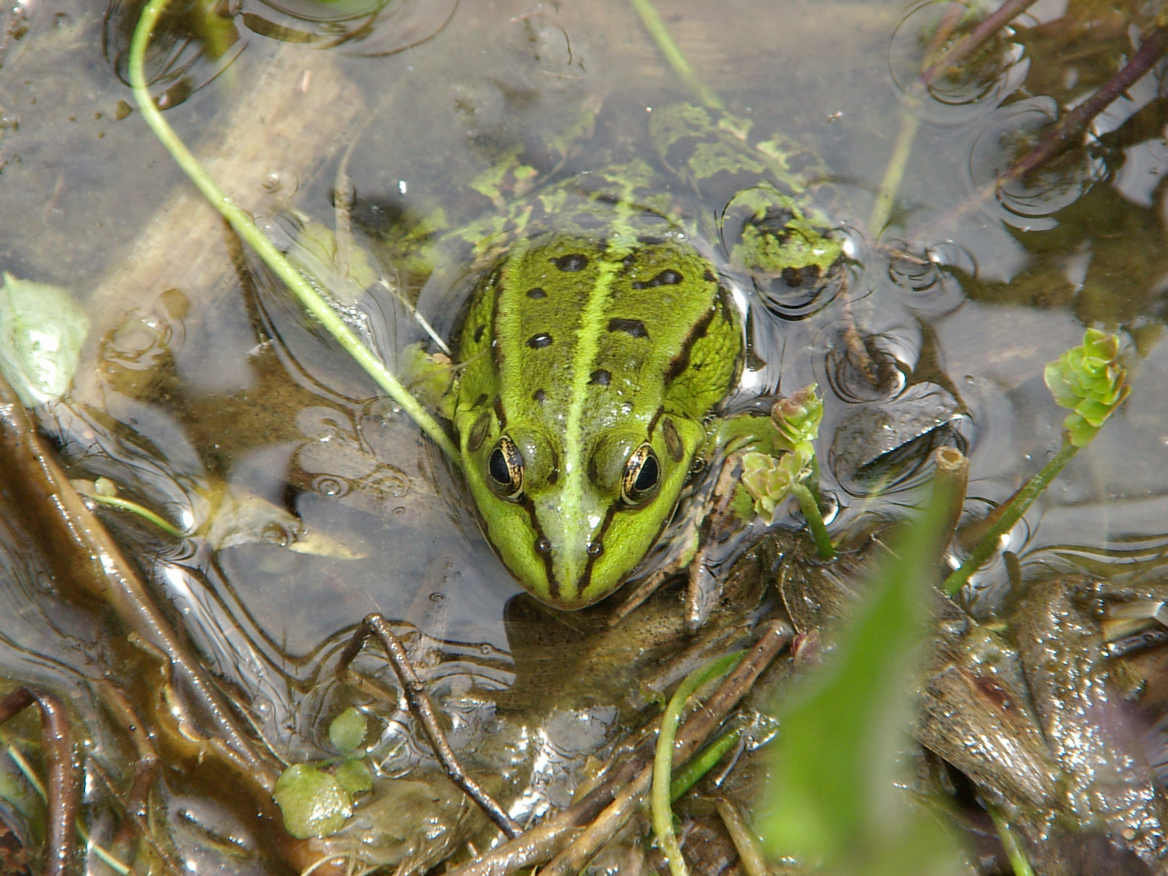 Żaba jeziorkowa Rana esculenta